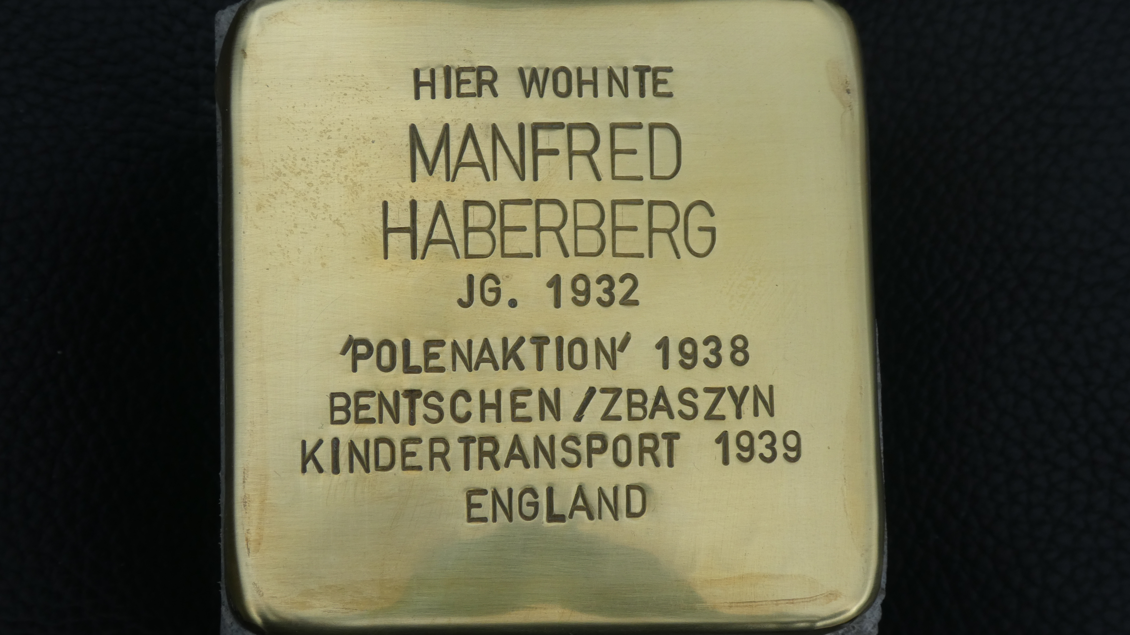 Manfred Haberberg, 2018